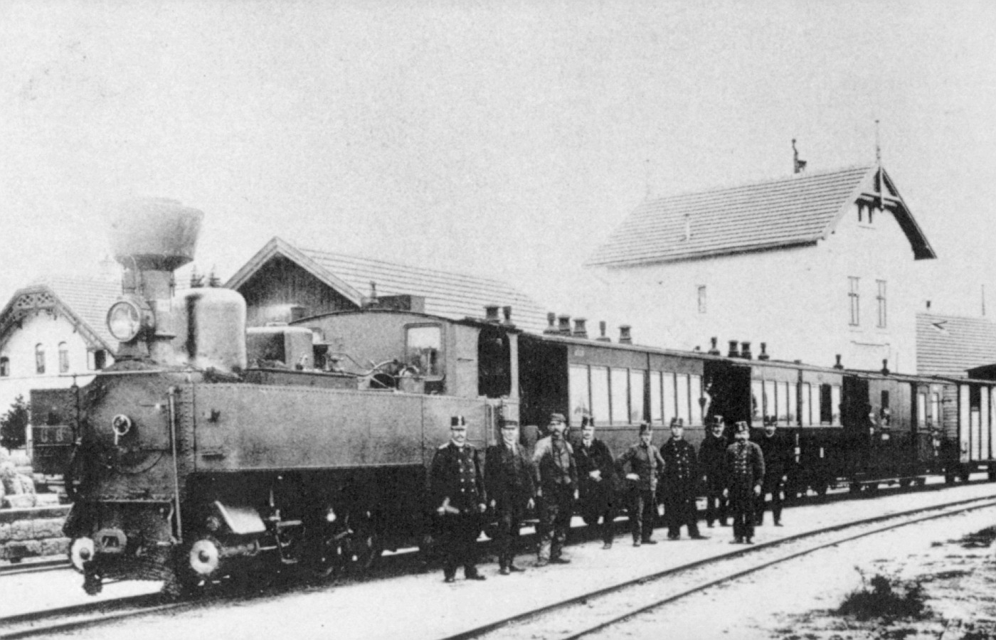 Niederösterreichische Landesbahnen U-class engine No. 8 with passenger train in Heidenreichstein station, Waldviertler Schmalspurbahnen - Niederösterreichische Landesbahnen, Lok der Reihe U (NÖLB No.8) mit Personenzug im Bahnhof Heidenreichstein der Waldviertler Schmalspurbahnen.